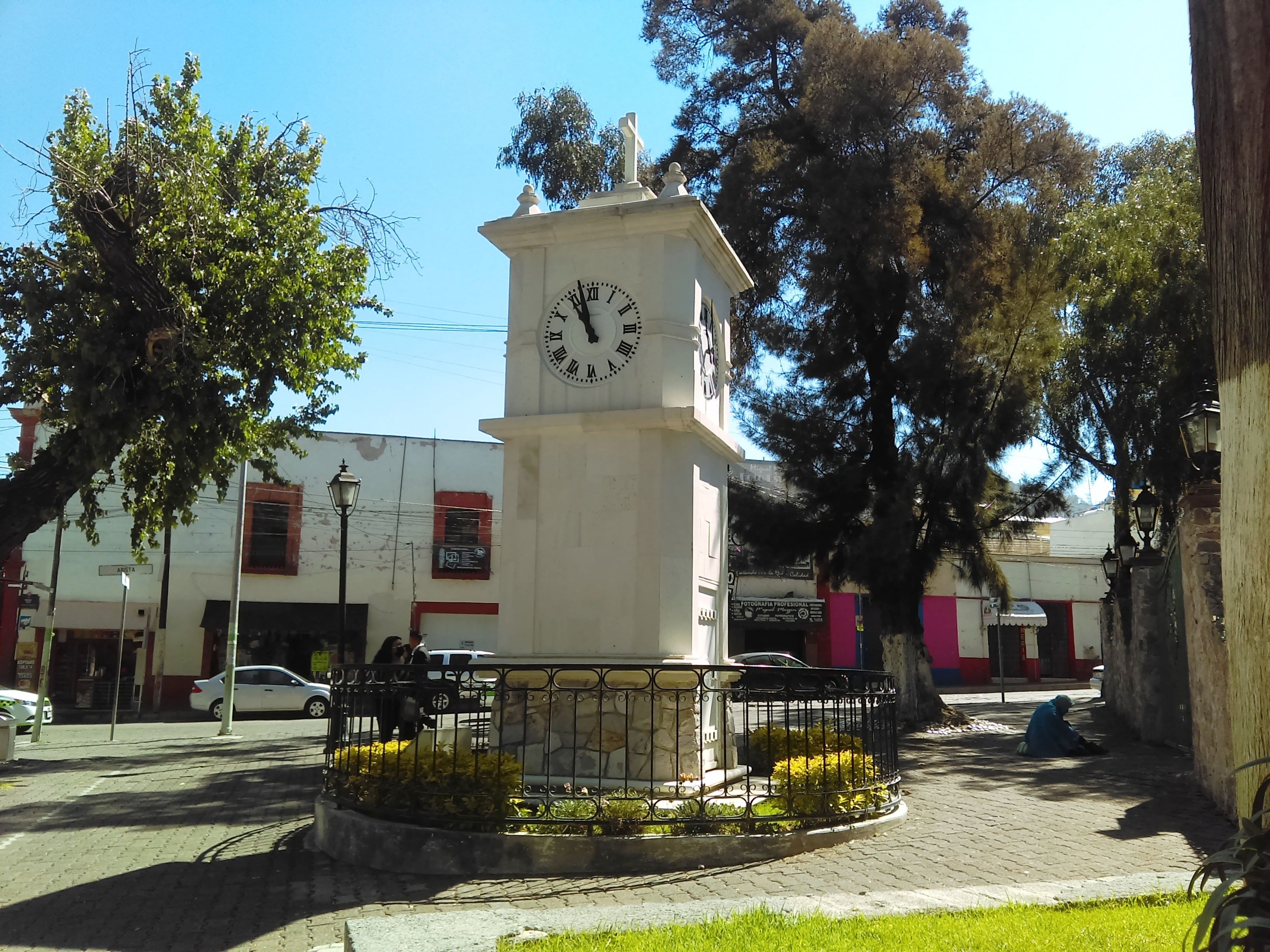 Exconvento de San Francisco en Pachuca, México.